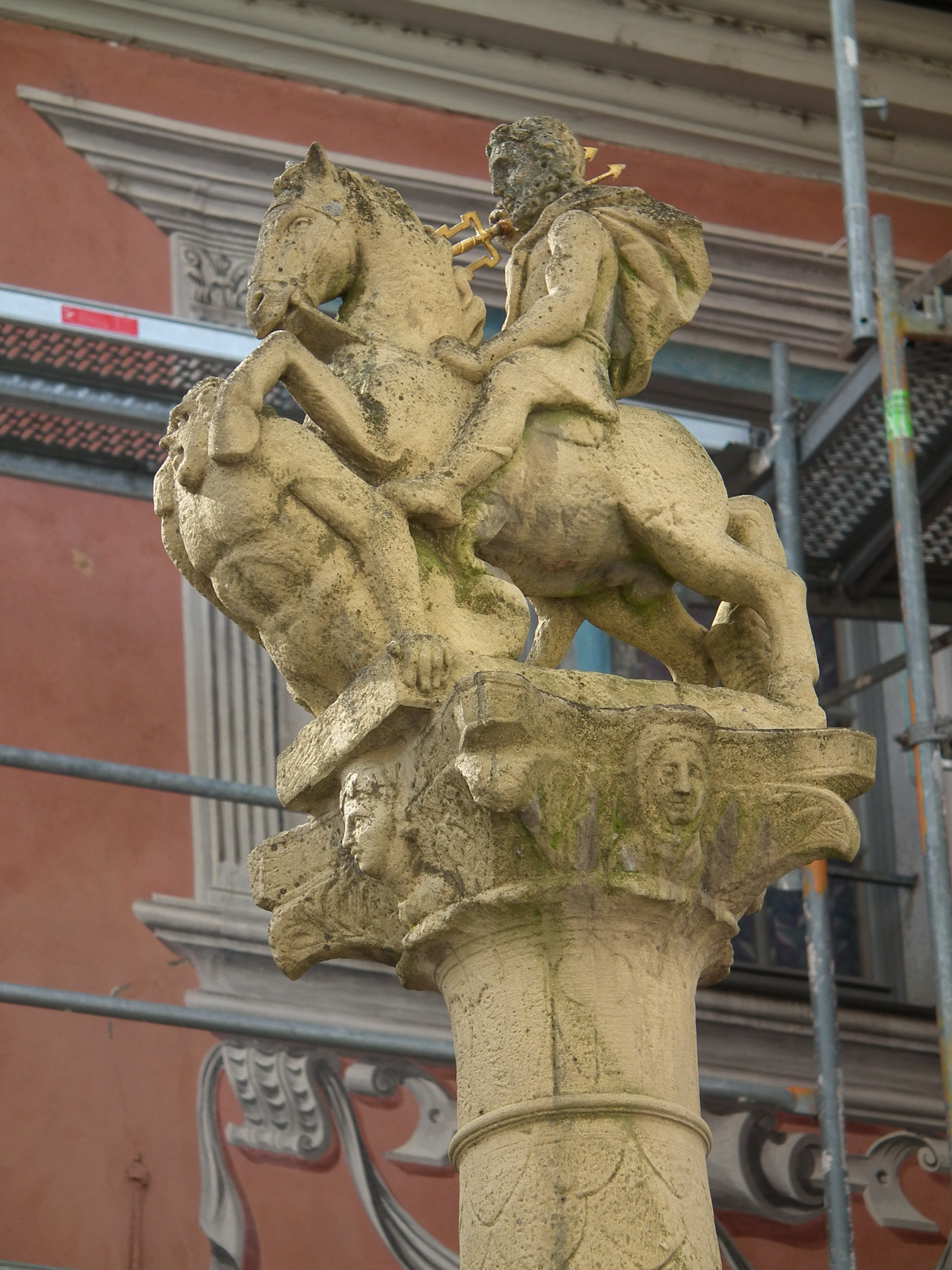 Jupitergigantensäule in Ladenburg: Jupiter sitzt mit einem Blitzbündel in der erhobenen Rechten zu Pferde, reitet über einen Erdgiganten hinweg, der sich mit seiner Keule symbolhaft unter der Last der Pferdehufe duckt. Darunter Jahreszeitenkapitell mit Frauenköpfen, ruhend auf einer Säule mit blattartigen Schuppen als Lebensbaum